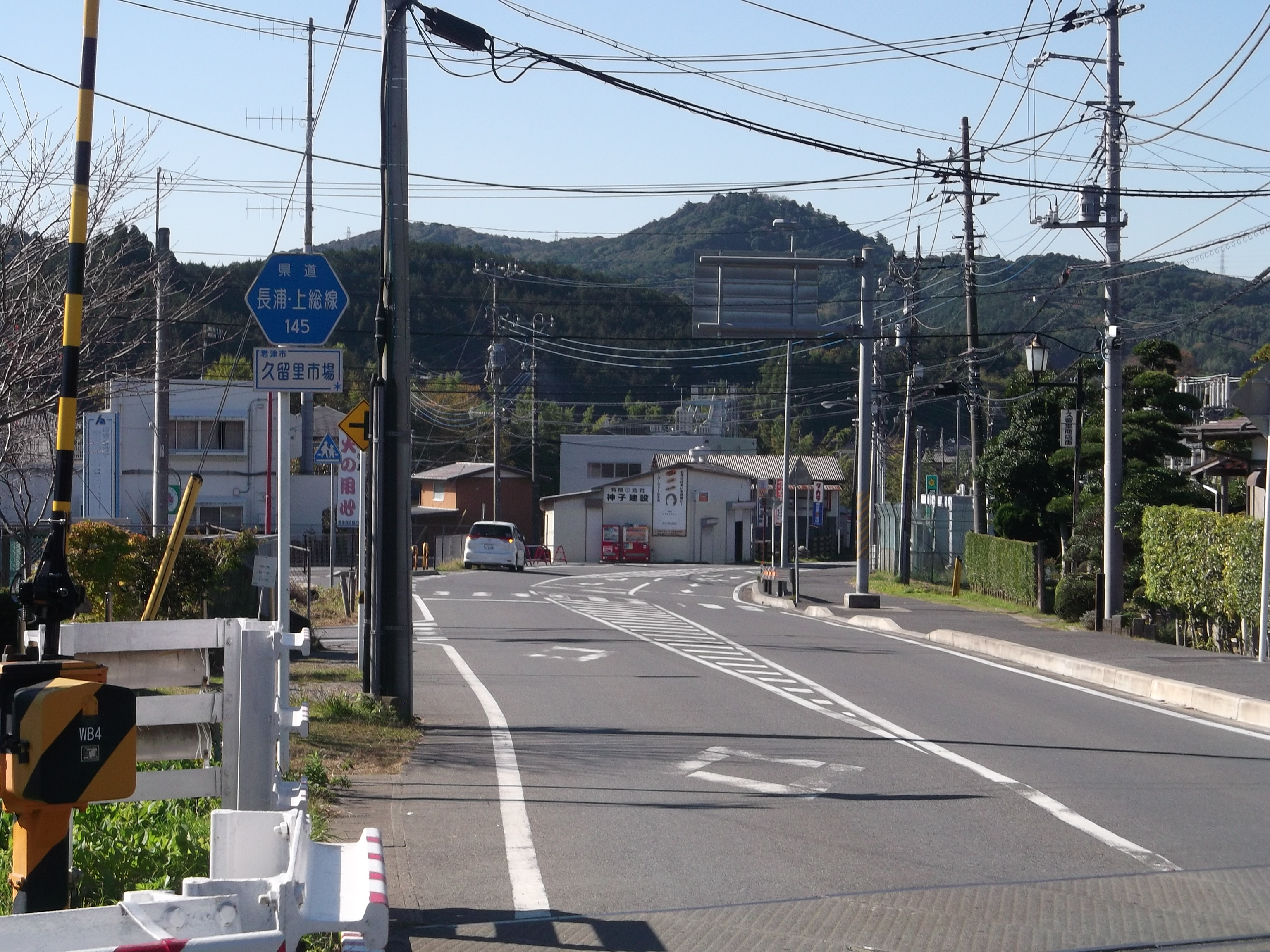 千葉県道145号長浦上総線 千葉県君津市久留里市場高倉街道踏切付近